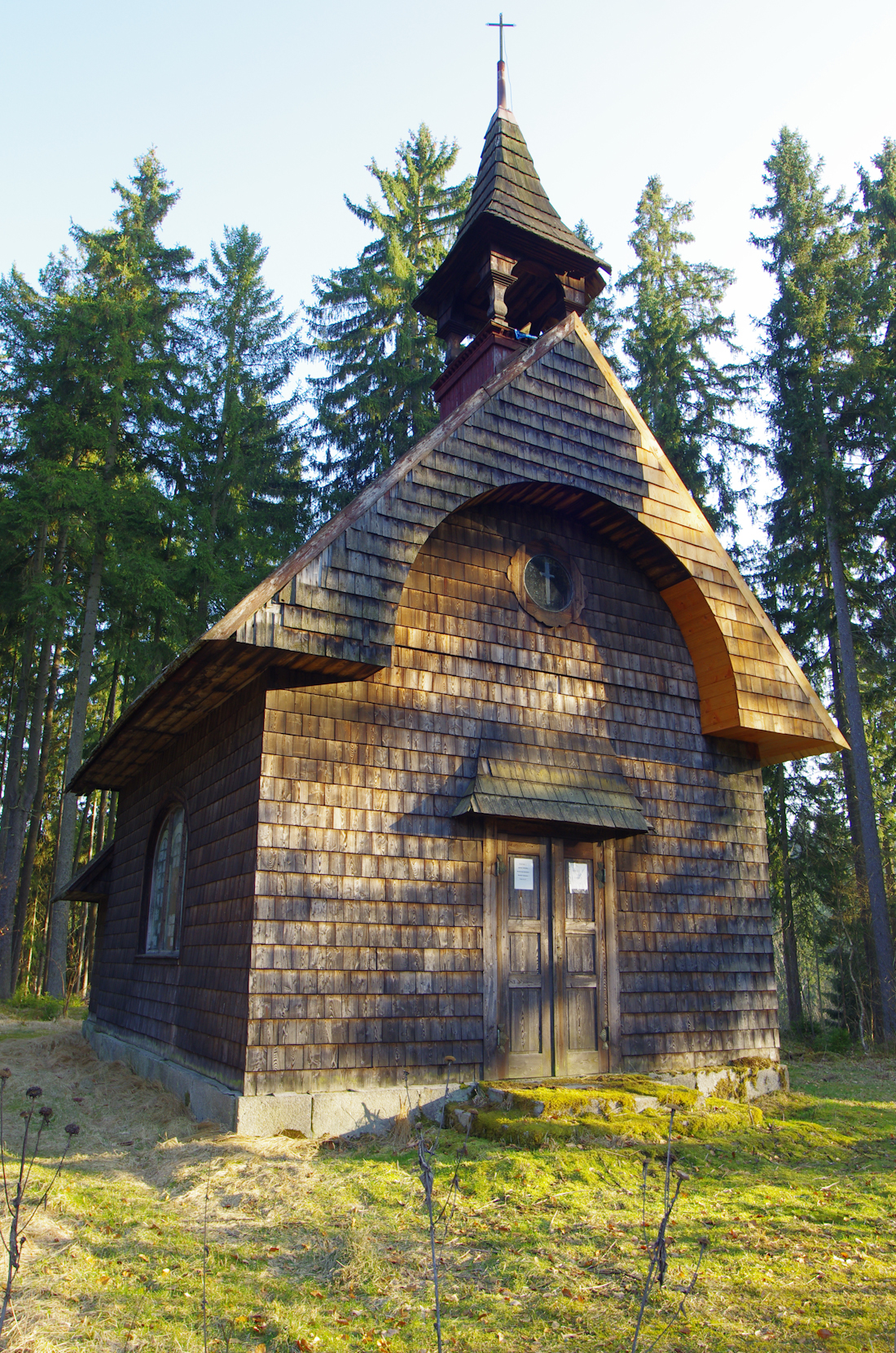 Šindelová, Krušné hory, kaple sv. Terezie z Avily (nesprávně kaple sv. Huberta) nedaleko loveckého zámečku Favorit